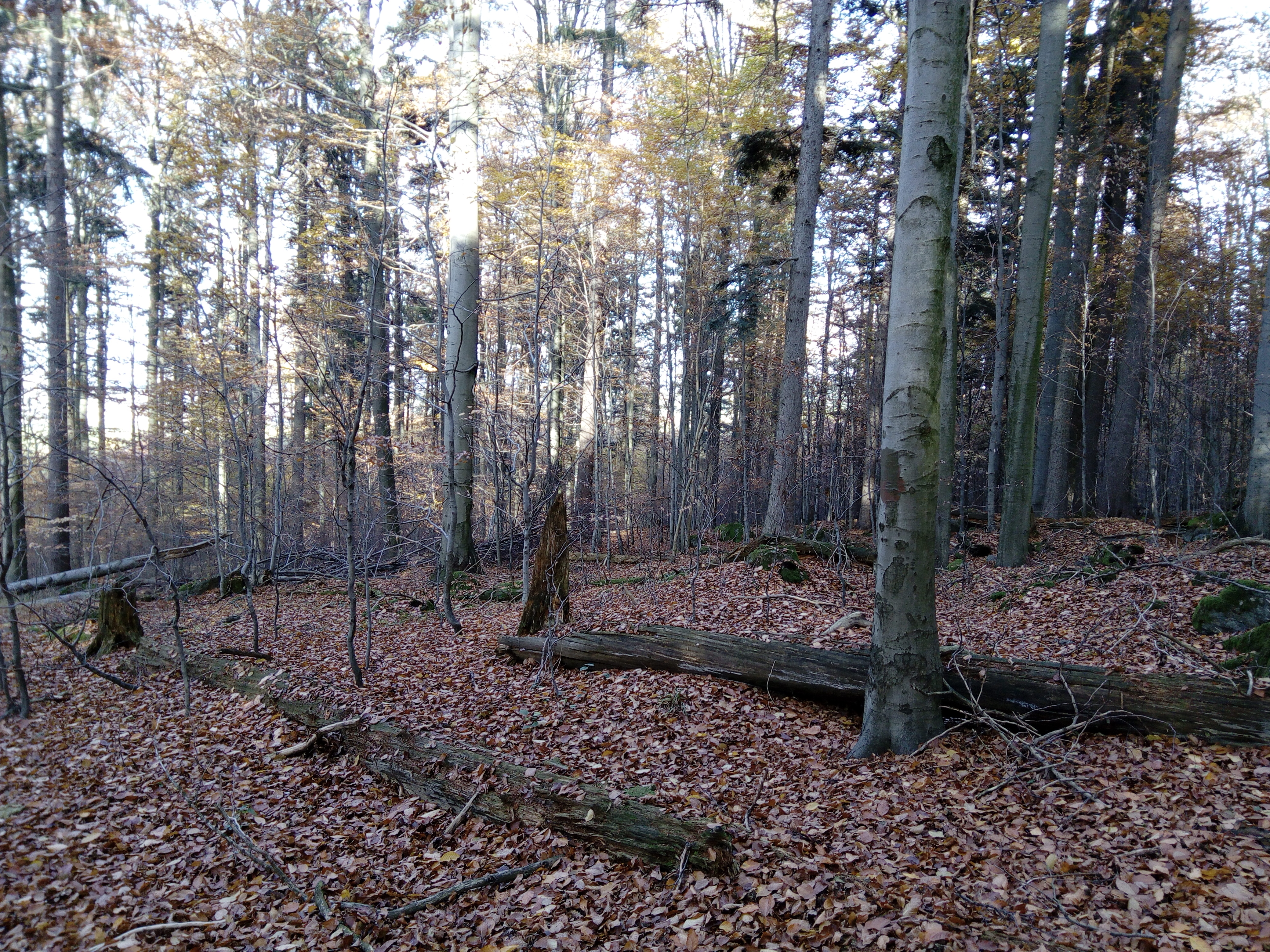 Území má charakter pralesa